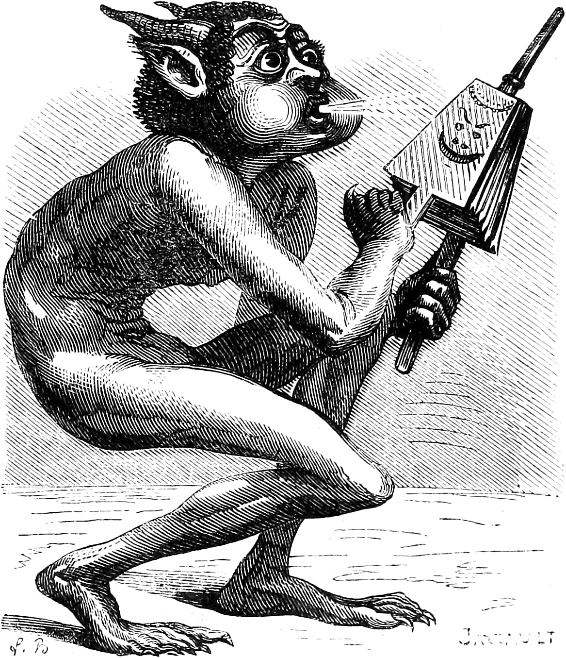 Une illustration pour l’article Xaphan dans le Dictionnaire infernal par Collin de Plancy.